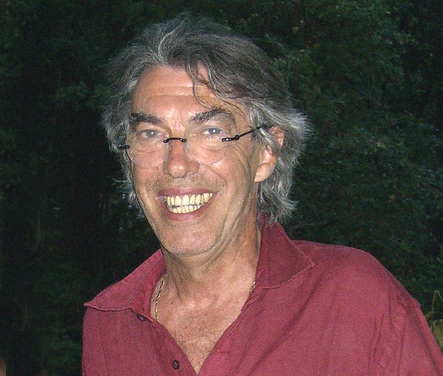 Michela Lanza e Massimo Moratti